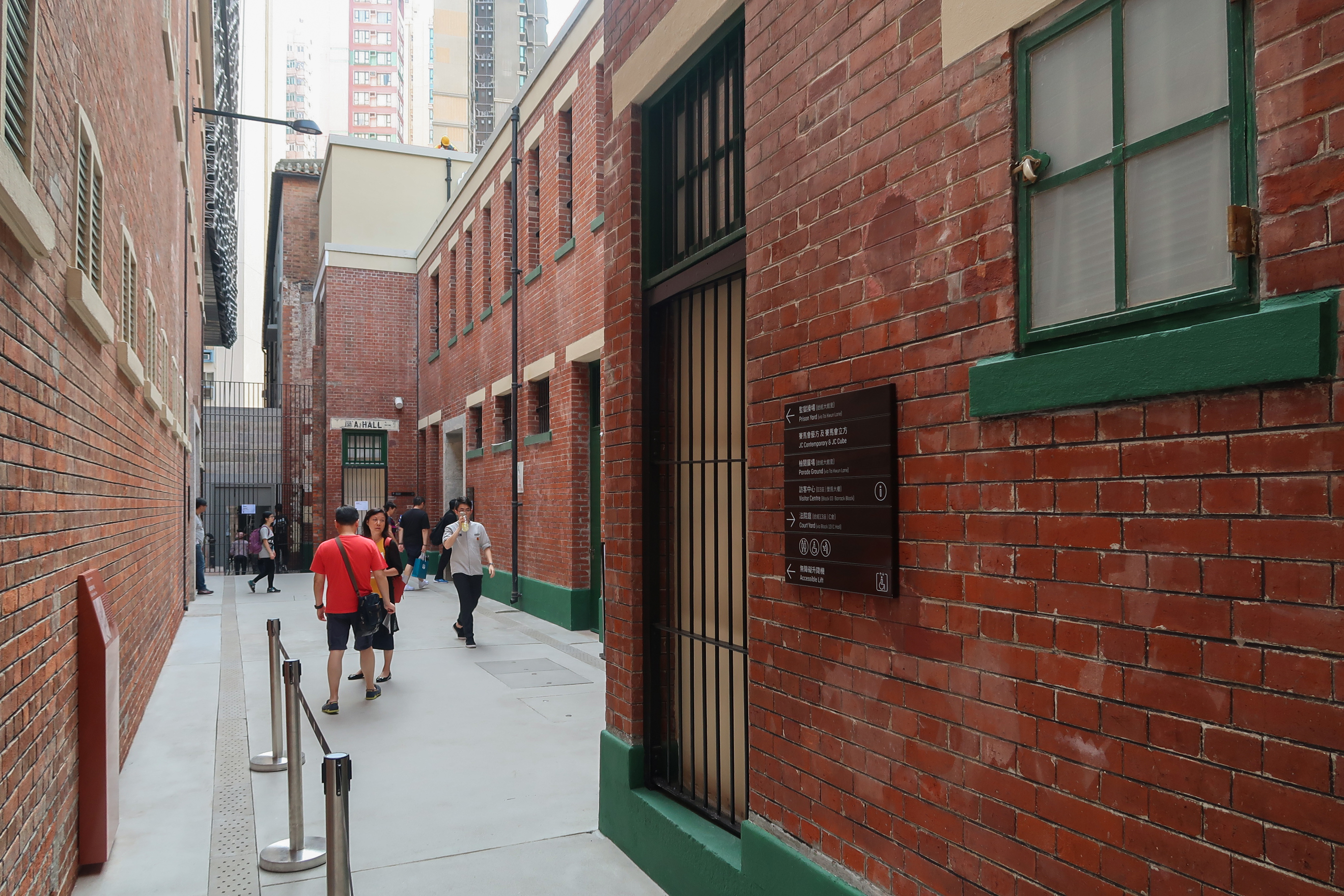 Tai Kwun A Hall outside